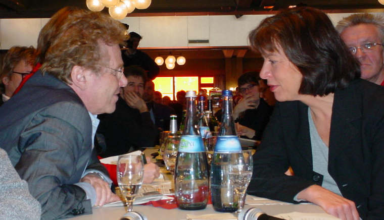 Rebecca Harms beim Politischen Aschermittwoch in Biberach/Riß 2004 im Gespräch mit Daniel Cohn-Bendit. Eigenes Foto von The weaver 14:19, 15. Apr 2004 (CEST), zur Verfügung gestellt von Weberberg.de, der Website für Biberach, GNU-FDL